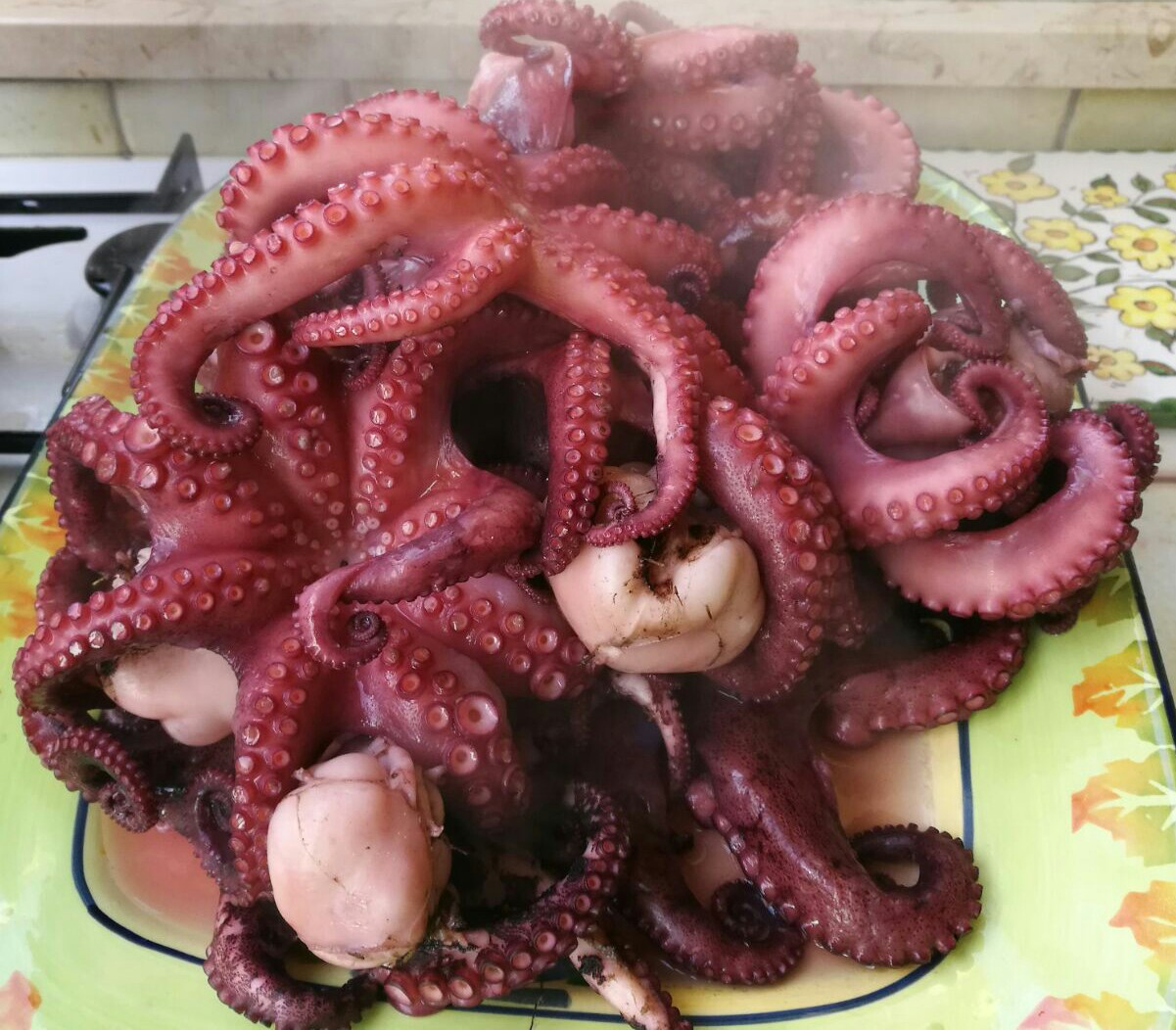 Polpi siciliani bolliti